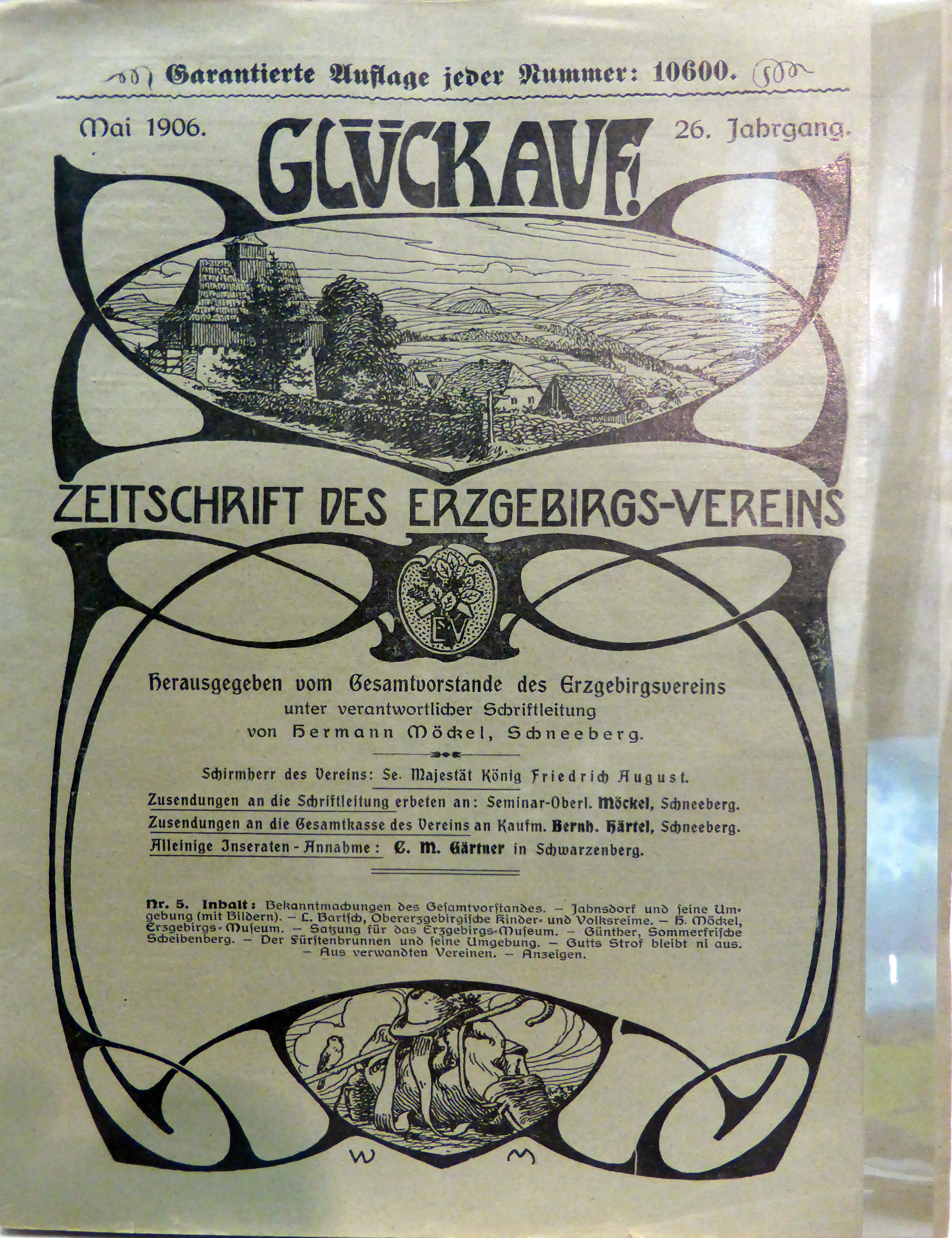 Glück auf! - Zeitschrift des Erzgebirgsvereins (Mai 1906). Ausgestellt im Museum sächsisch-böhmisches Erzgebirge in Marienberg.